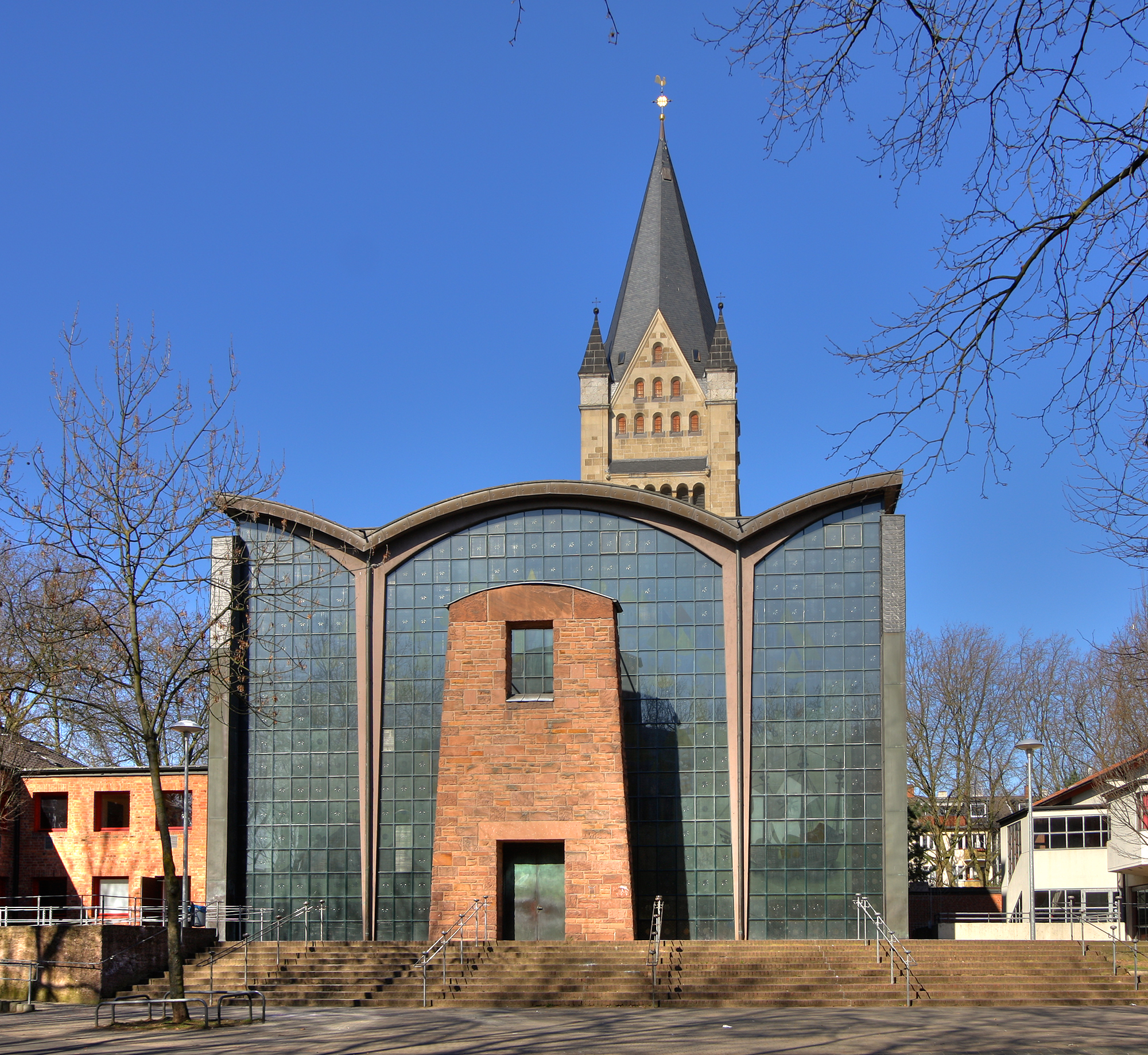 Kirche St. Anna, Köln-Ehrenfeld. Architekt: Gottfried Böhm